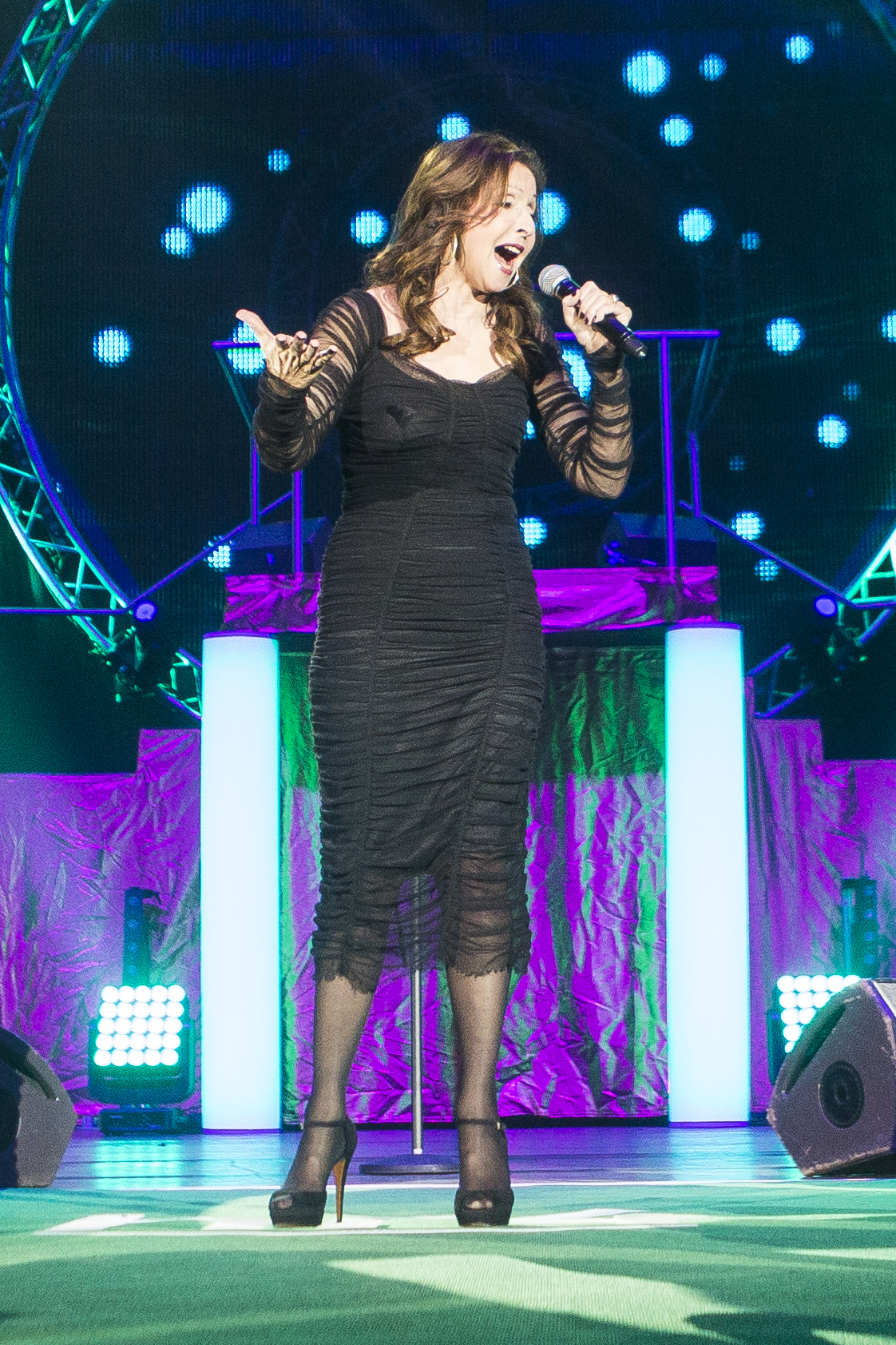 Die griechisch-deutsche Sängerin Vicky Leandros am 26.11.2016 in der Festhalle Frankfurt.